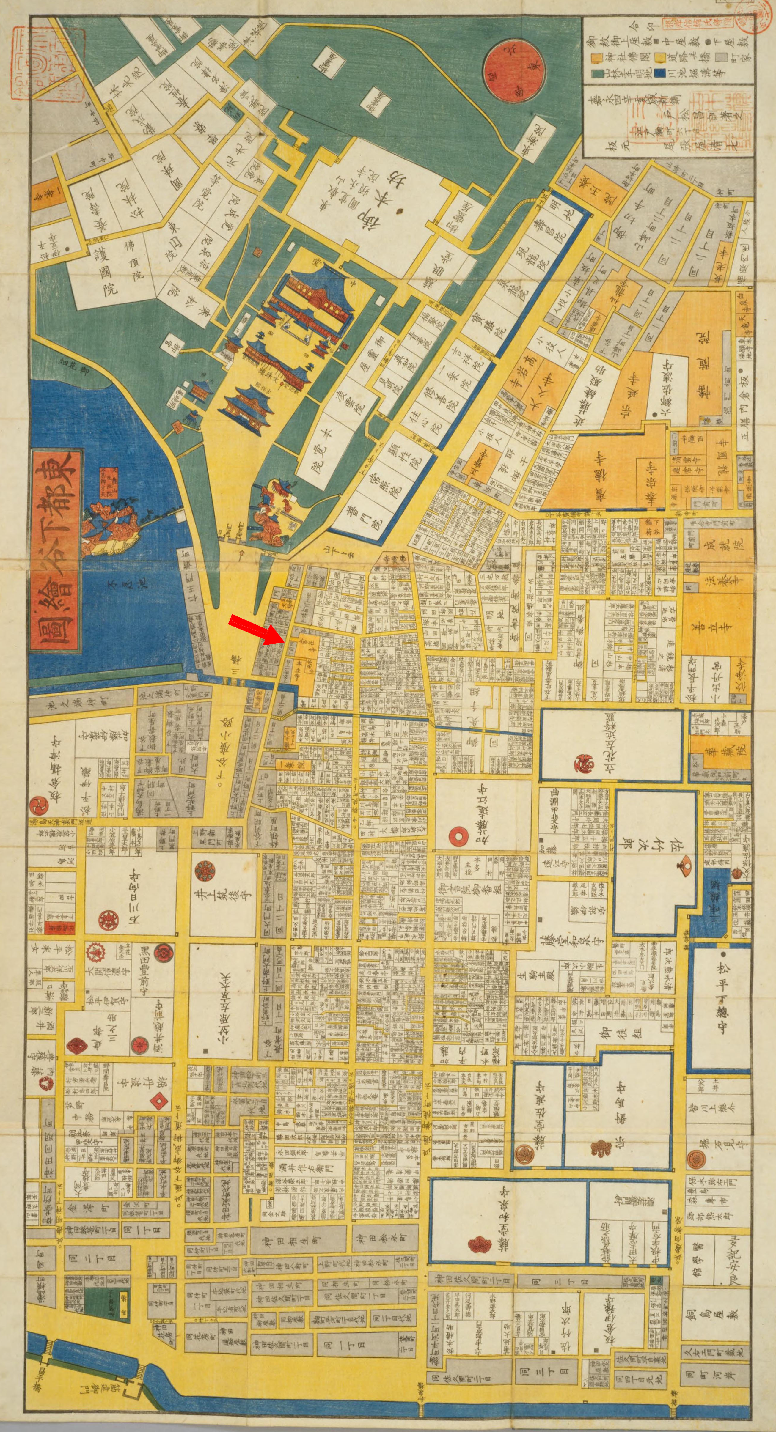 江戸時代の下谷付近の古絵図